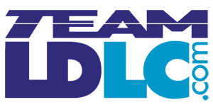 Logo der E-Sport-Organisation Team LDLC